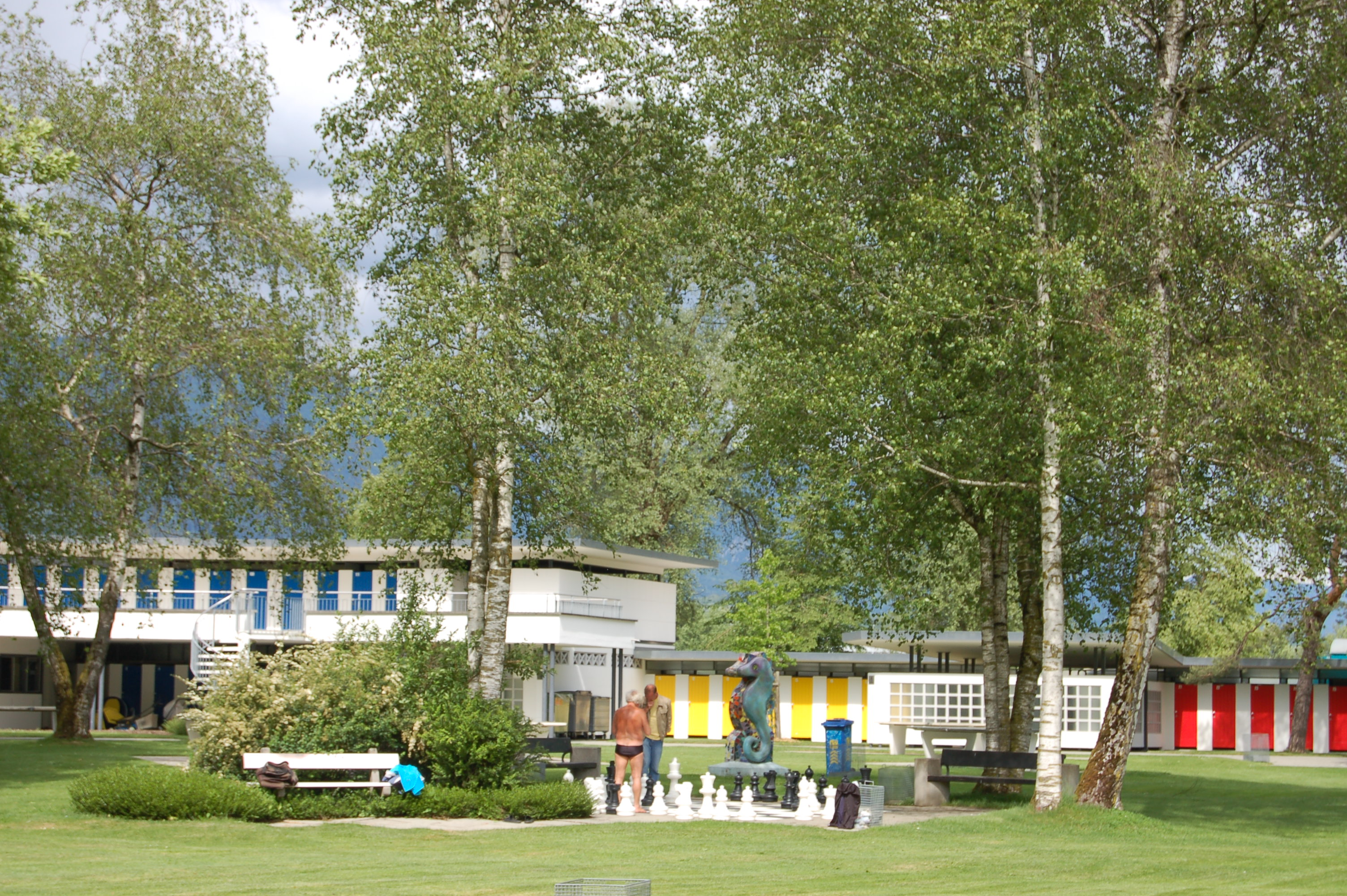 Renoviertes Schwimmbad Grenchen Wakkerpreis Baute